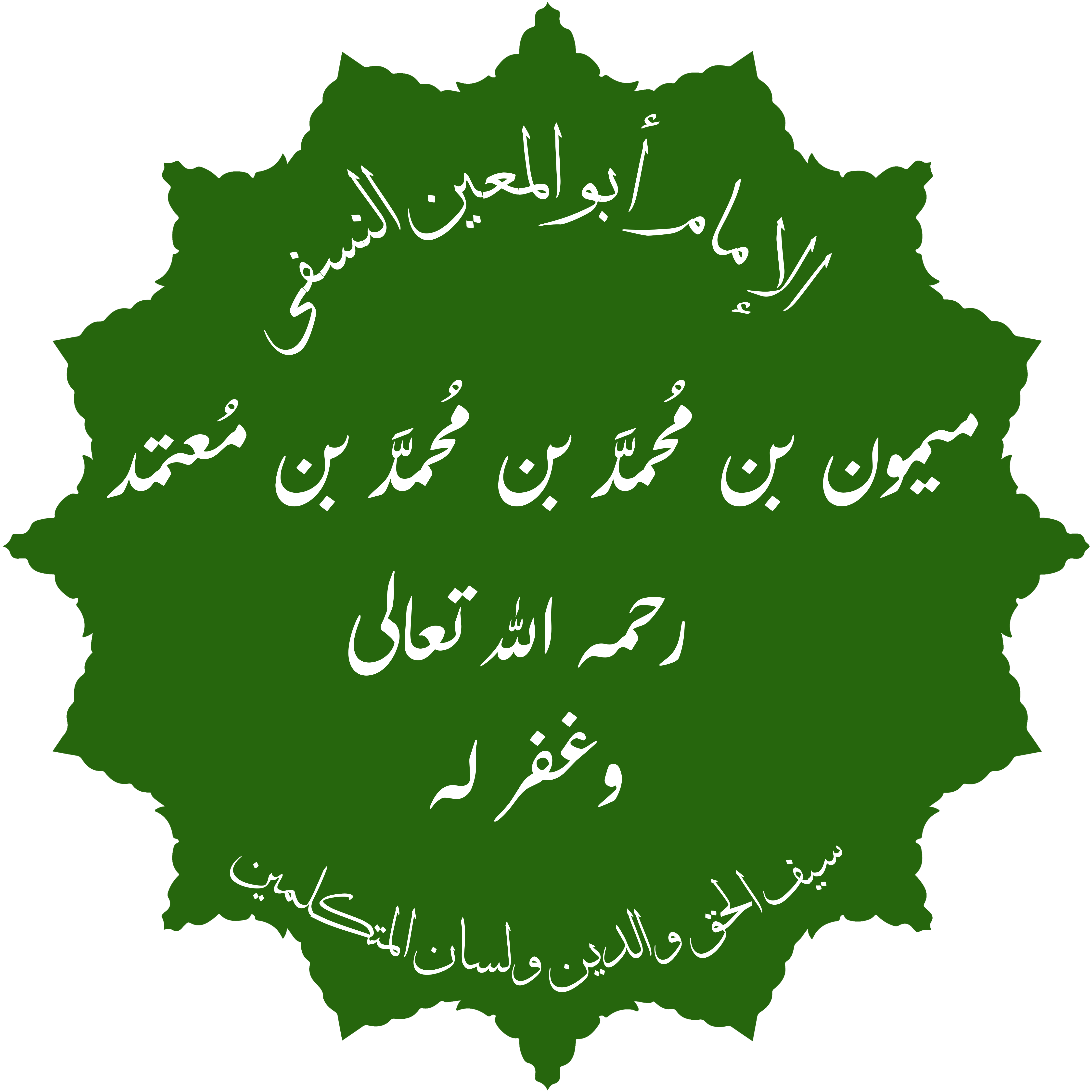 تخطيط لاسم الإمام أبو المُعين النسفي.